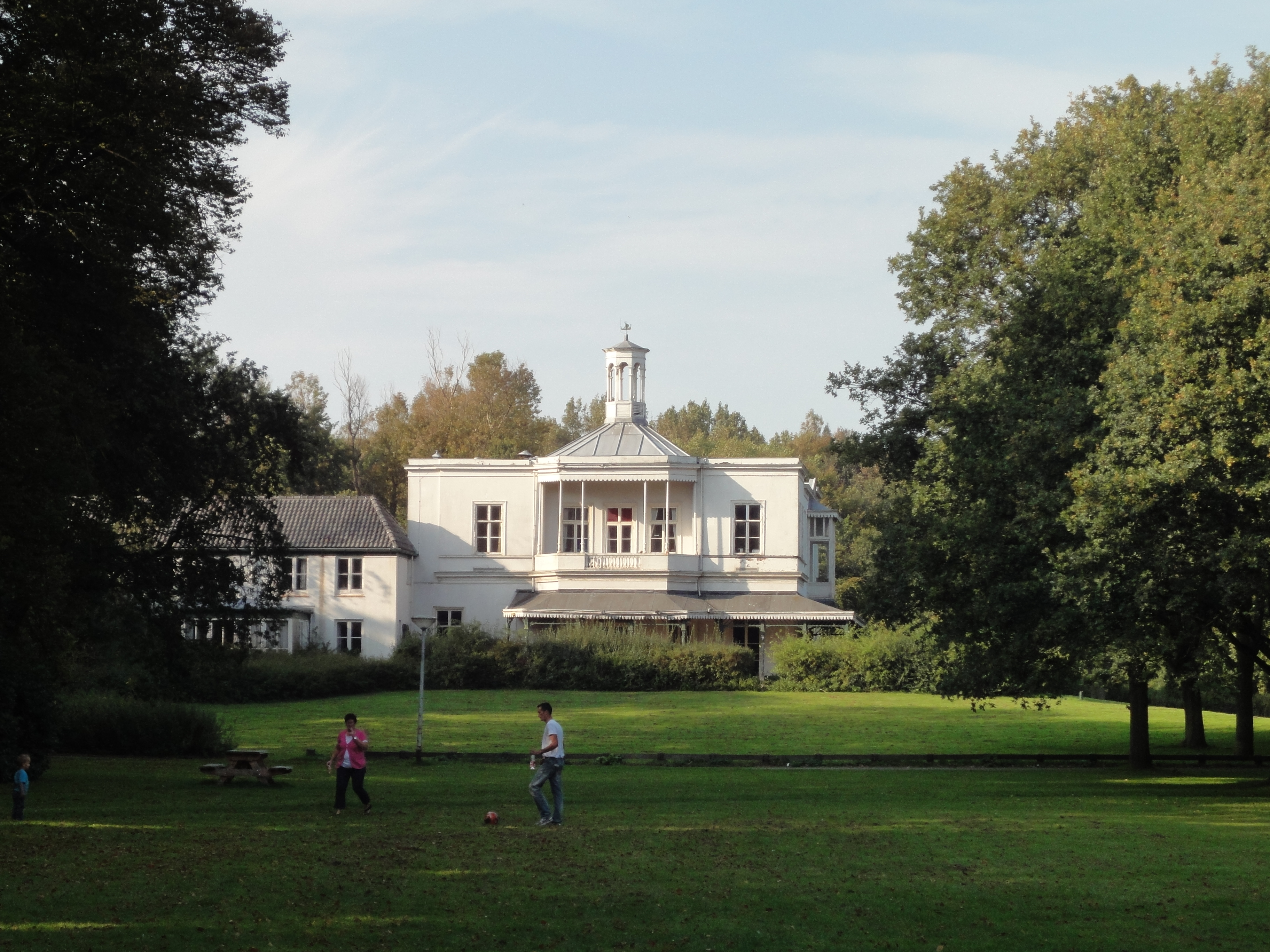 Ockenburgh